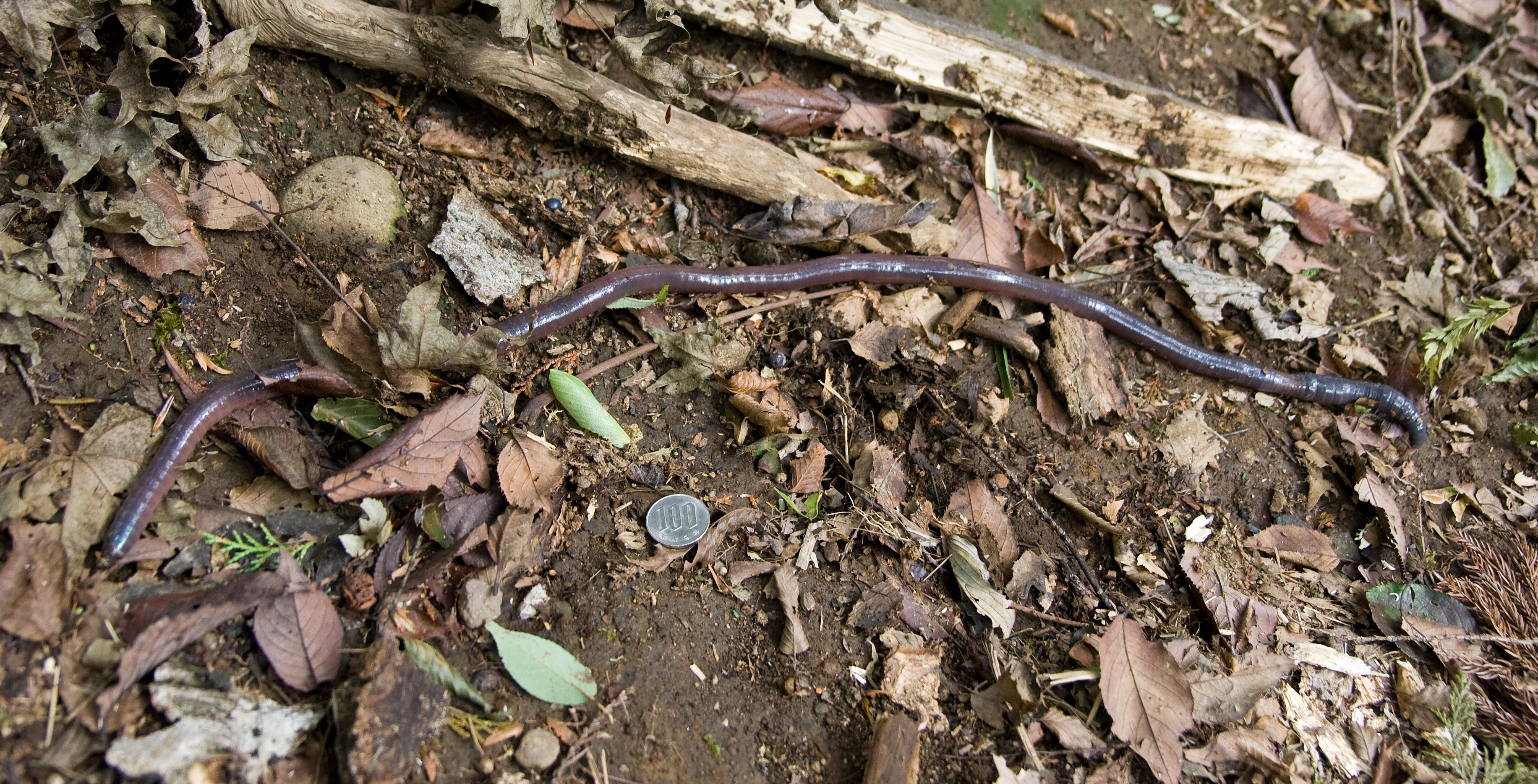 イイヅカミミズ (学名:Amynthas fuscatus)